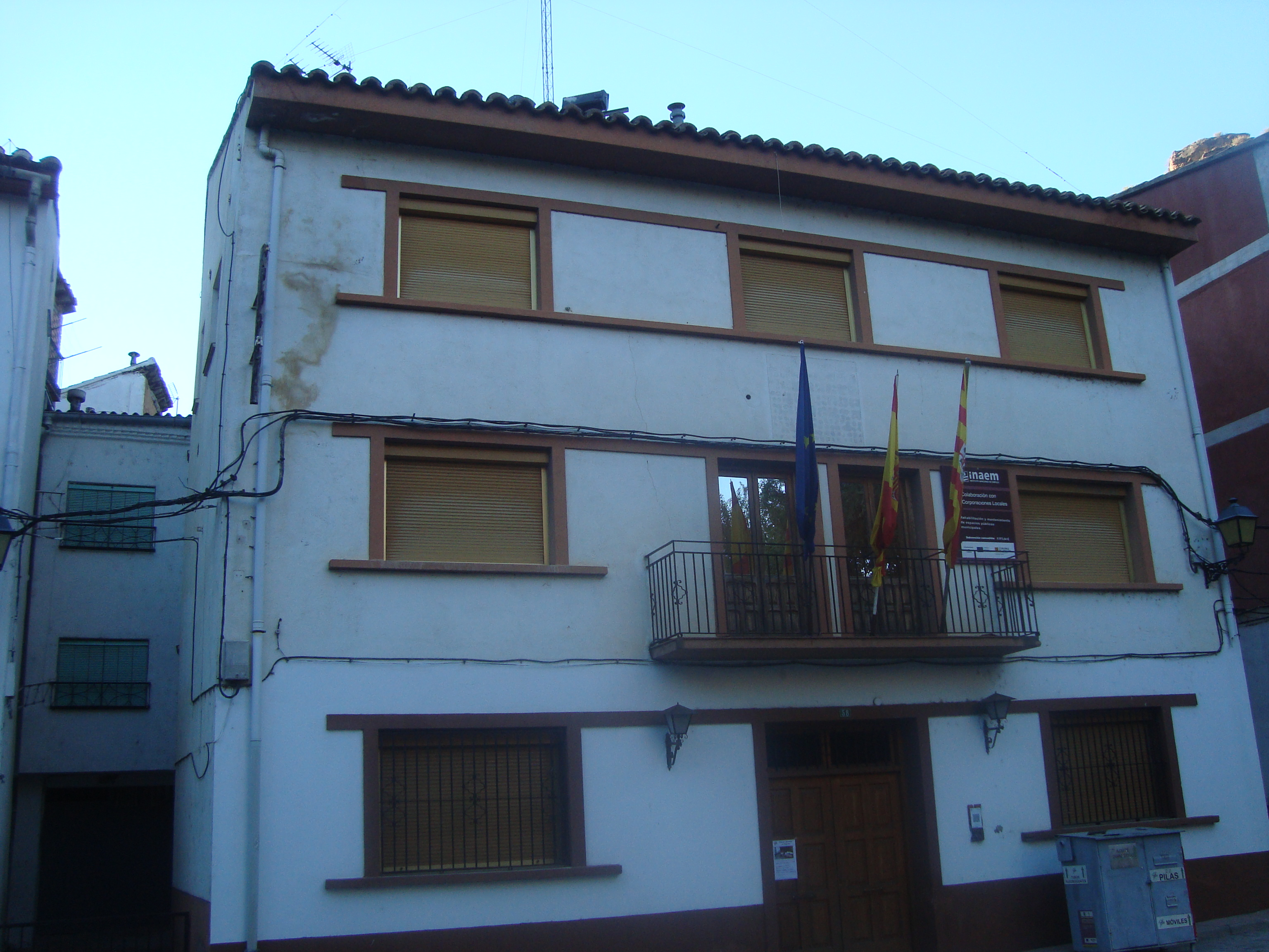 Ayuntamiento de Libros (Teruel)